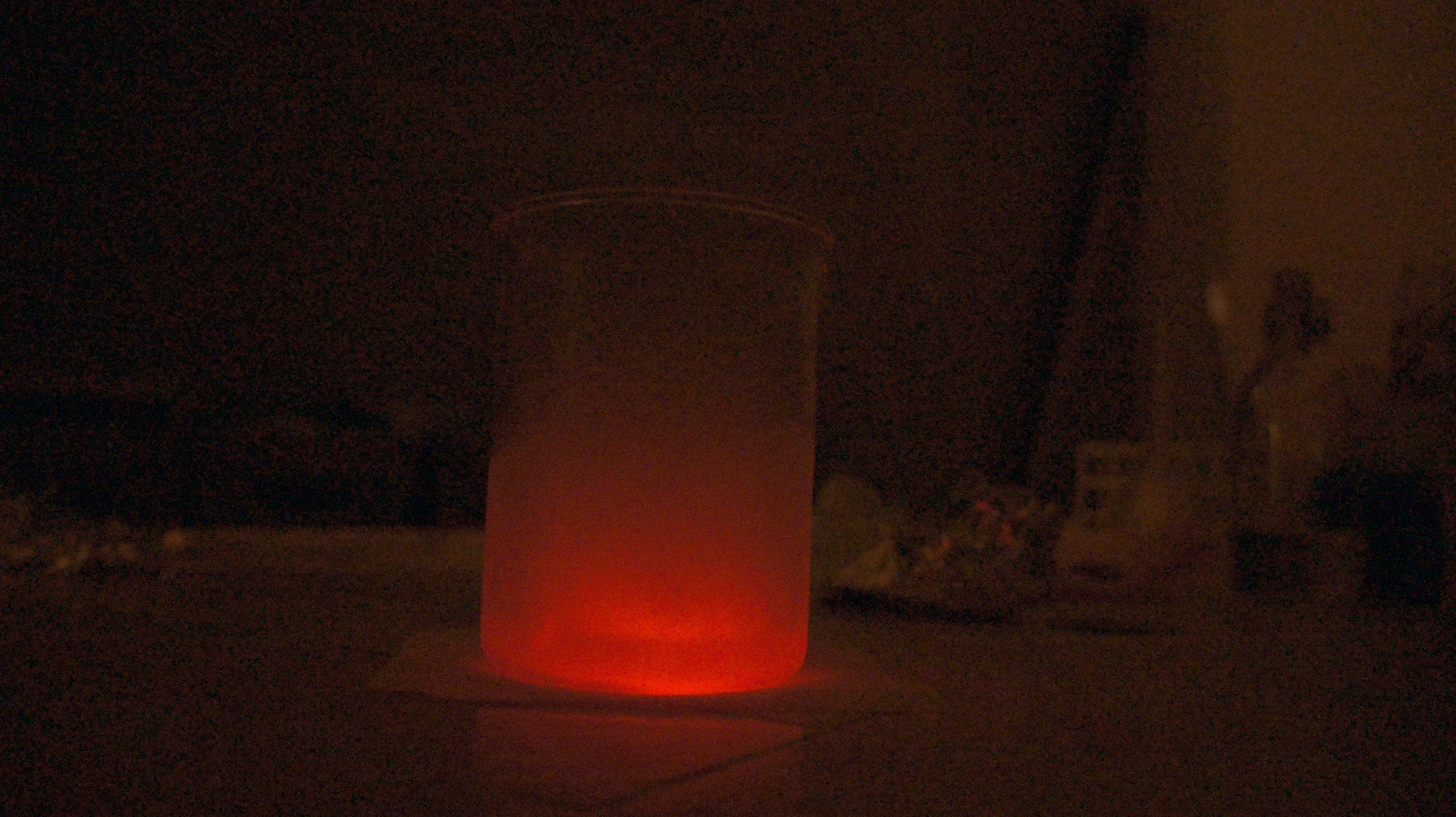 Tlen we wzbudzonym stanie singletowym świeci na czerwono. Ten efekt został otrzymany przez wrzucenie pastylki podchlorynu wapnia - Ca(ClO)2 (w tym przypadku był to środek do odkażania basenu) do silnie schłodzonego 30%-owego roztworu nadtlenku wodoru. Reakcja zachodzi według równania : ClO− + H2O2 → 1O2 + H+ + Cl− + OH−. Po kilku sekundach roztwór ogrzewa się (ponieważ reakcja jest egzotermiczna) i przestaje świecić.